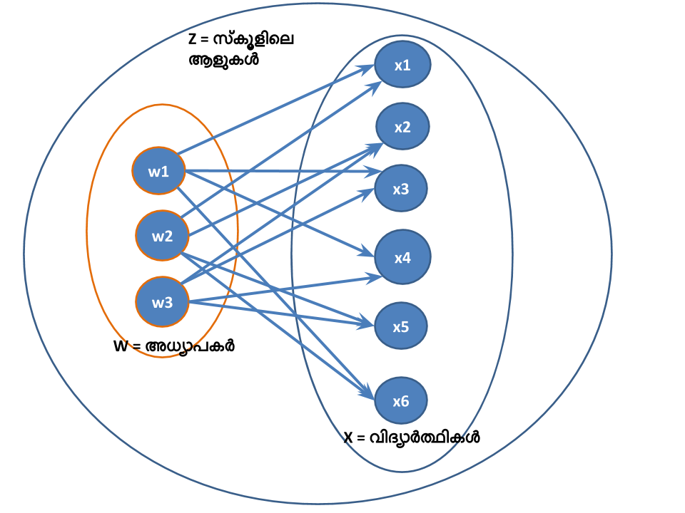 ബൈപാർട്ടൈറ്റ് ഗ്രാഫിന്റെ ഒരു ഉദാഹരണം